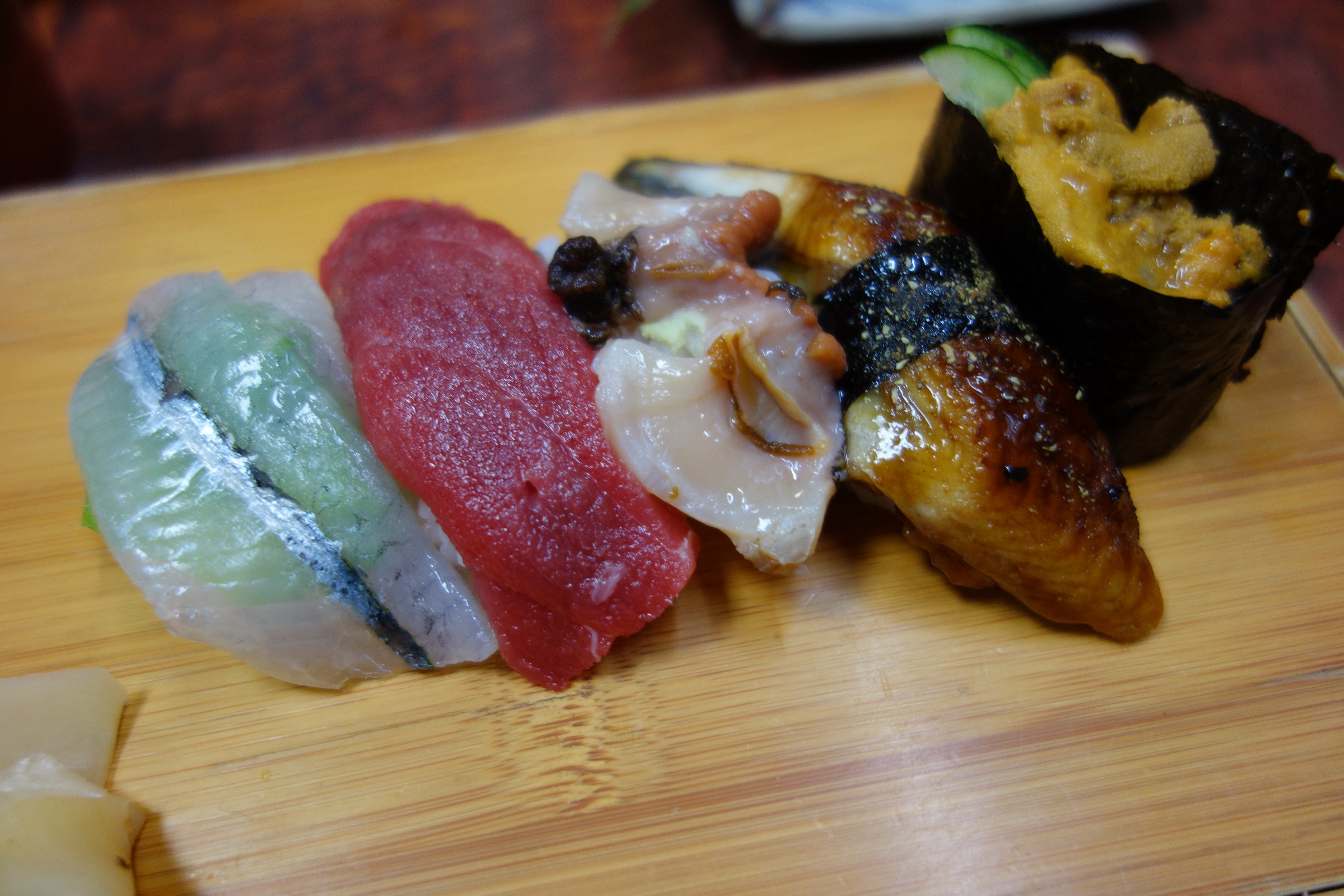 Sushi combo